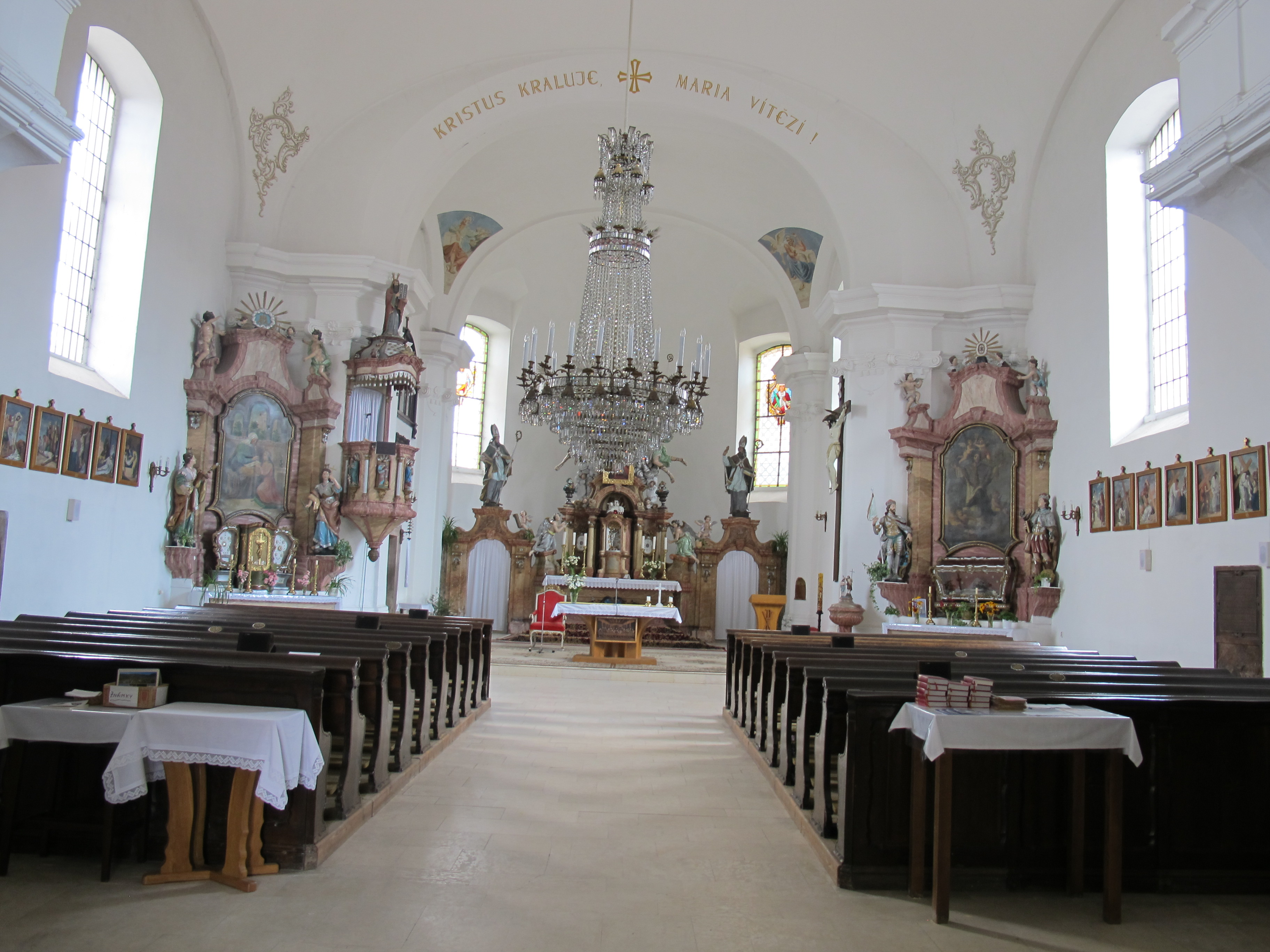 Kostel svatého Mikuláše, Lomnice nad Popelkou.